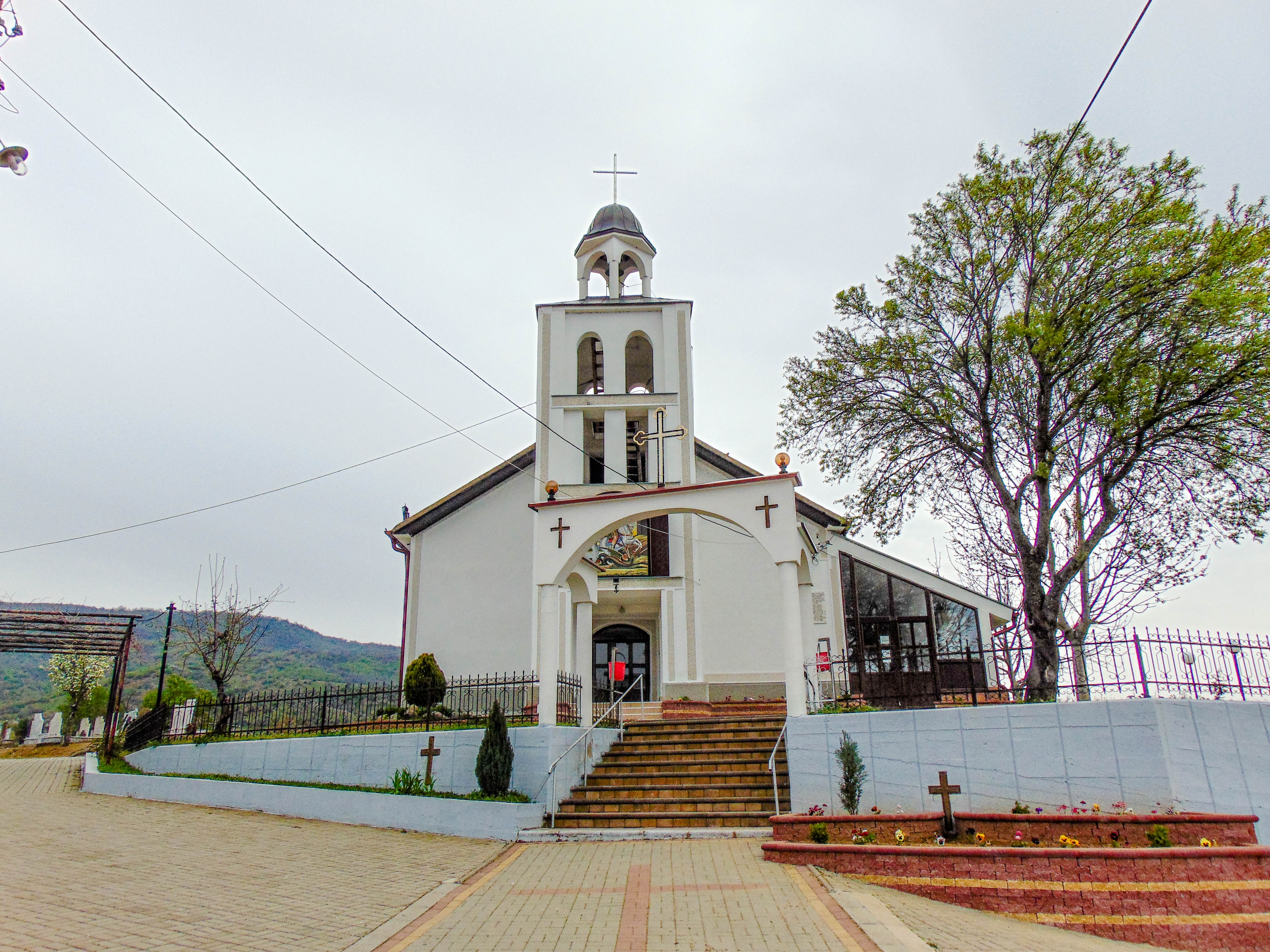 Црква „Св. Ѓорѓи“ - Сушица